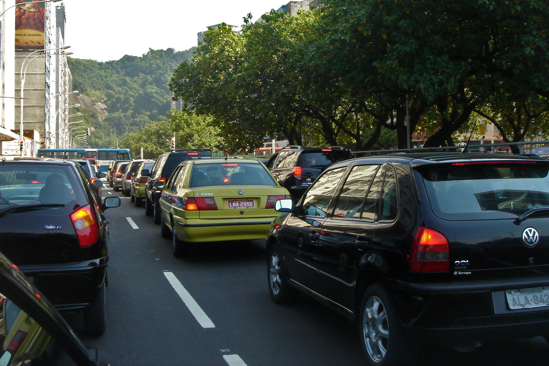 Traffic congestion, Rio de Janeiro (Leme), Brazil.